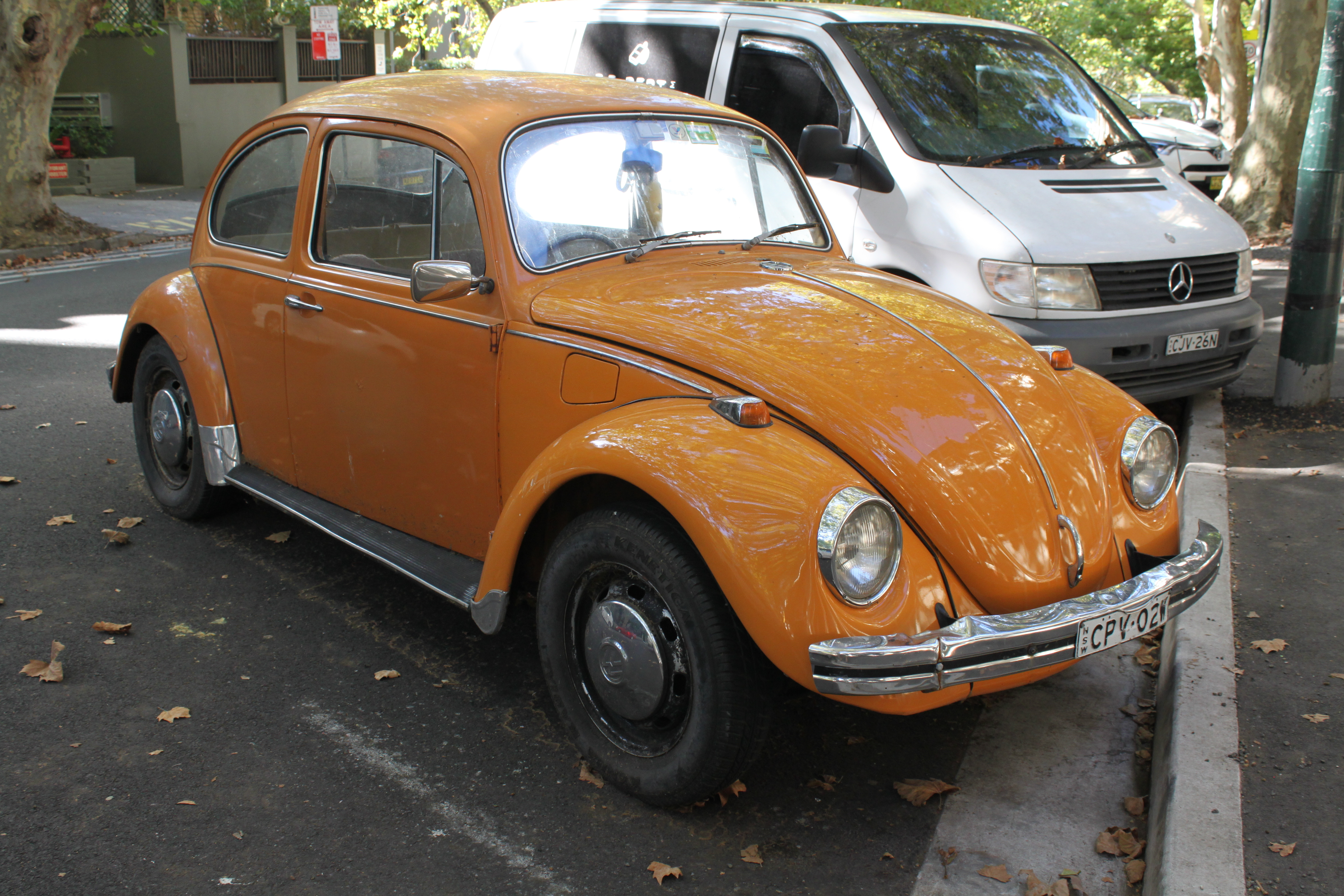 Volkswagen Type 1 Beetle